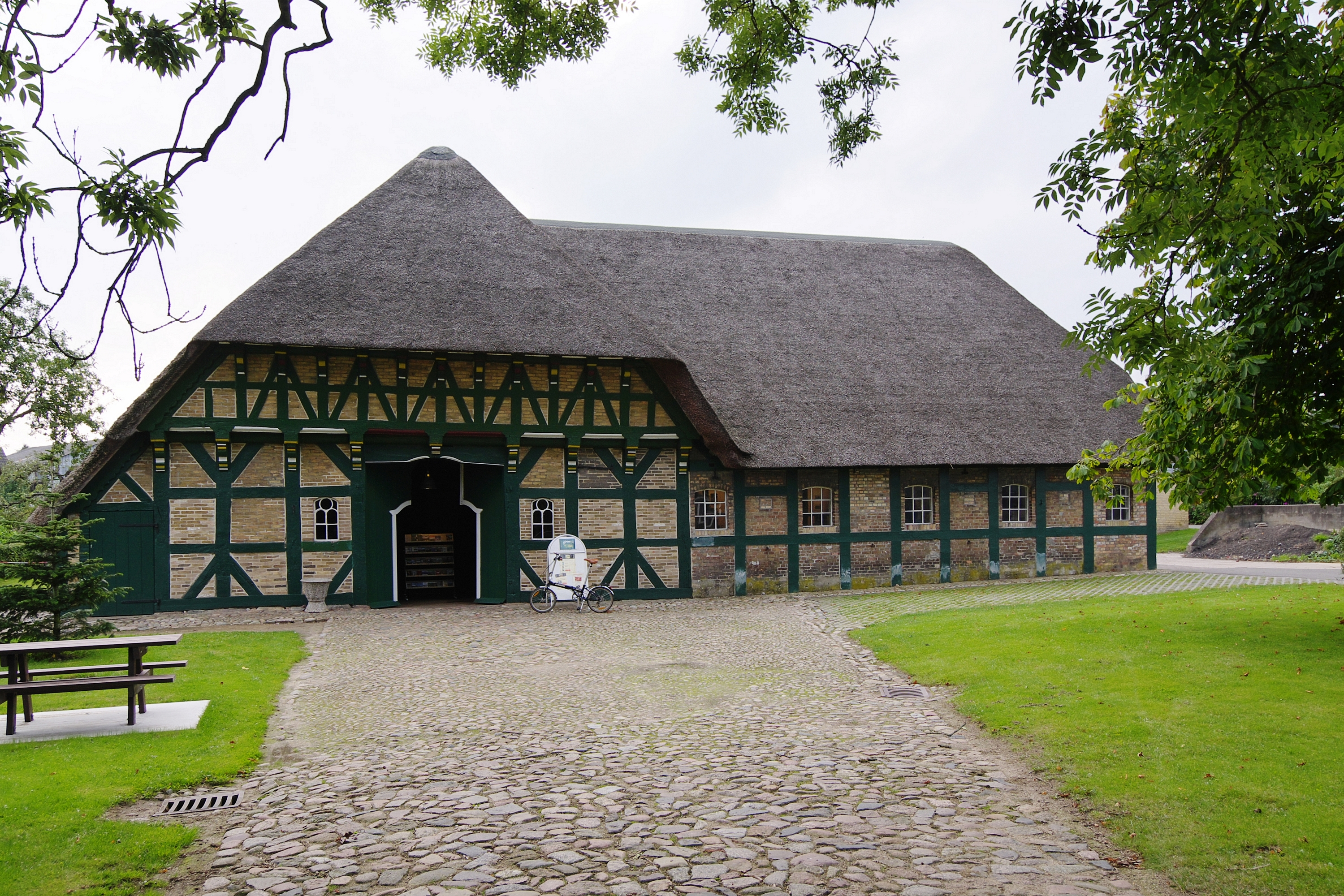 Denkmalgeschütztes Fachhallenhaus in Süderstapel.